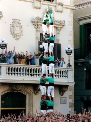 1ª Torre de 8 neta carregada de la història, Castellers de Vilafranca